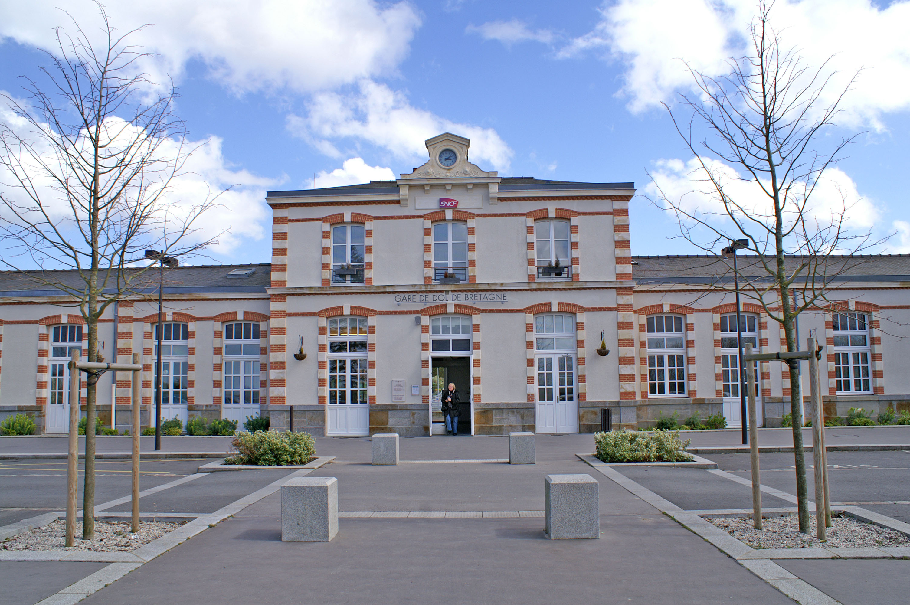 Entrée du bâtiment voyageurs de la gare de Dol-de-Bretagne.